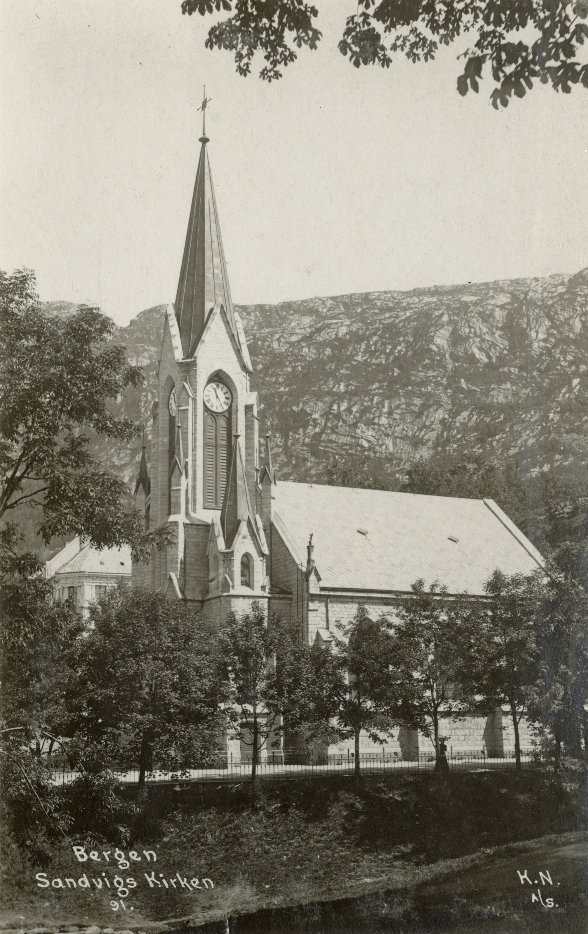 Sandviken Kirke, Hordaland